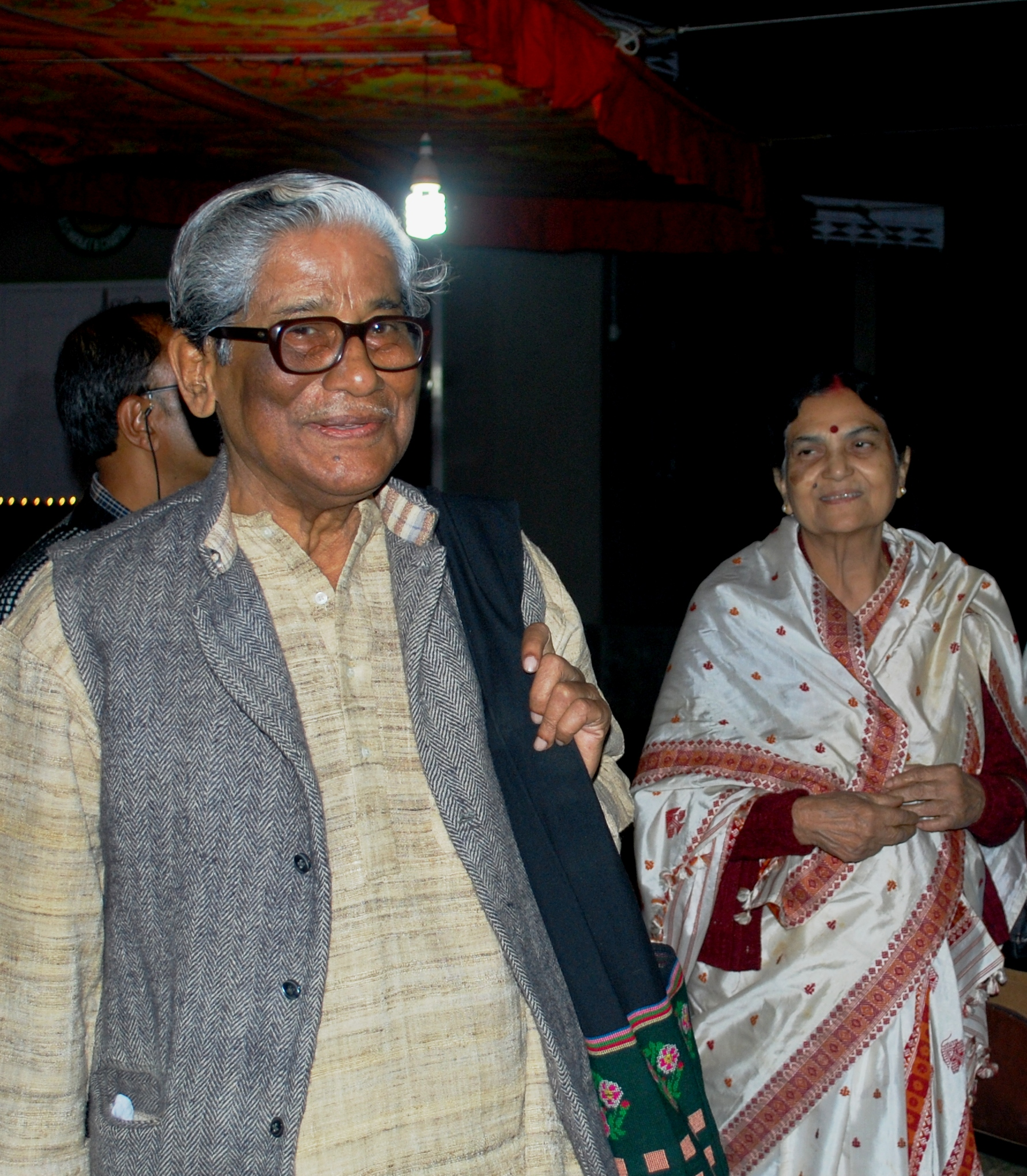 অসমীয়া: ডঃ বীৰেন্দ্ৰনাথ দত্ত অসমৰ এজন লিখক, প্ৰবন্ধকাৰ আৰু গৱেষক পণ্ডিত।